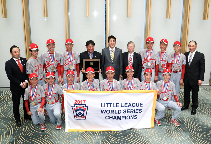 平成２９年１２月１１日、安倍総理は、総理大臣官邸でリトルリーグ世界選手権優勝チーム（東京北砂リトルリーグ）による表敬を受けた。